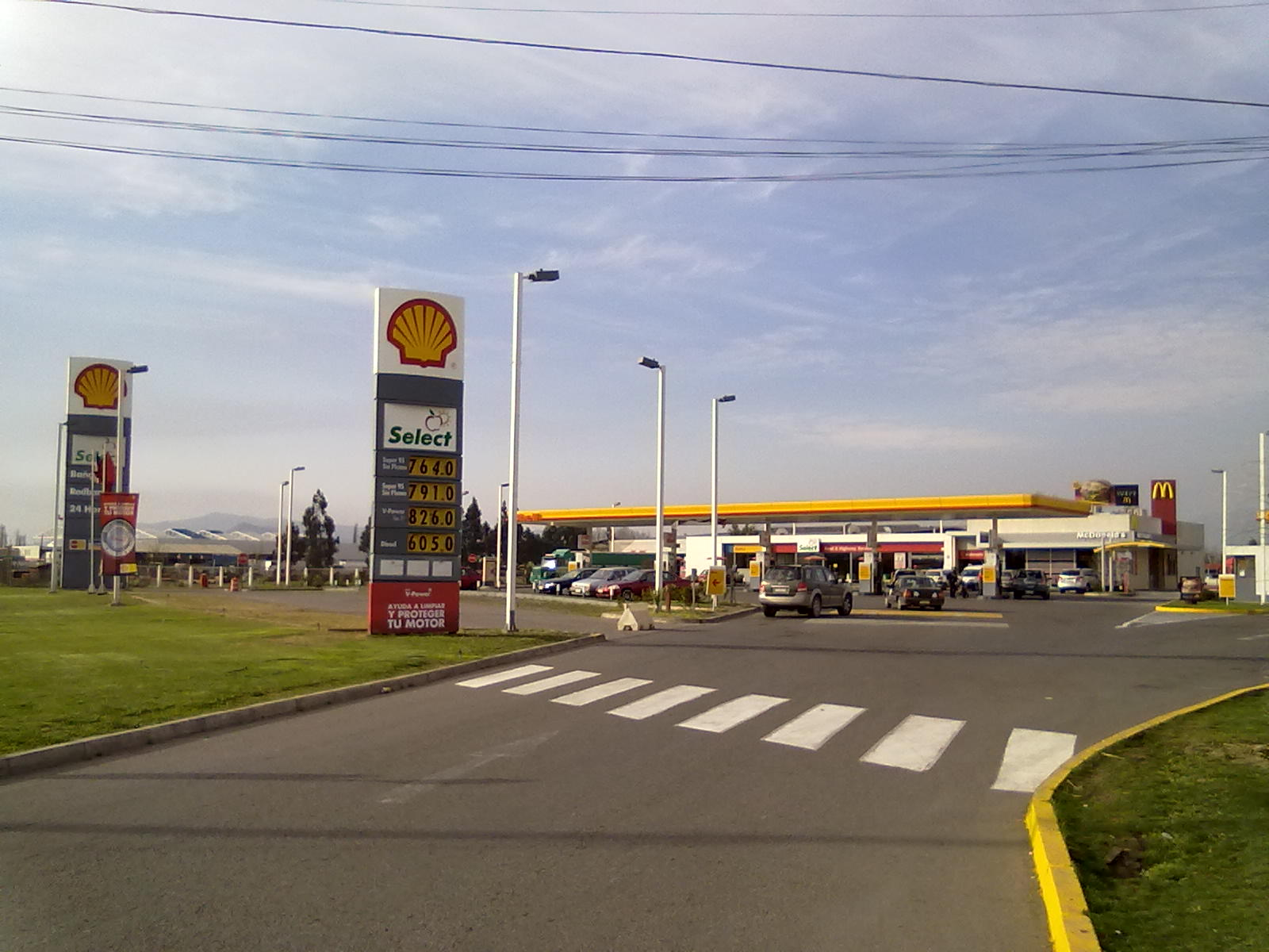 Estacion de Servicio Shell en Colina